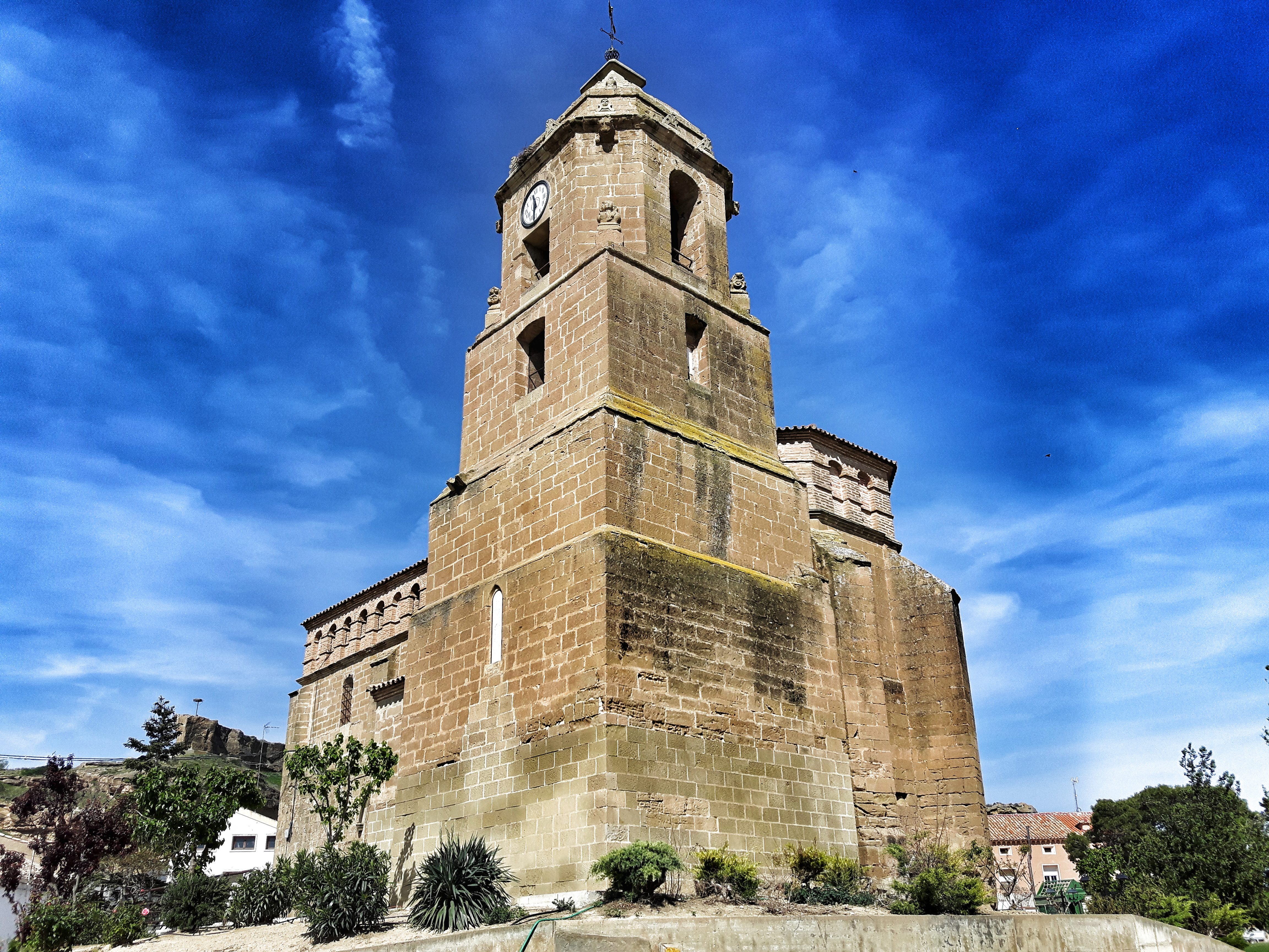 Alberuela de Tubo